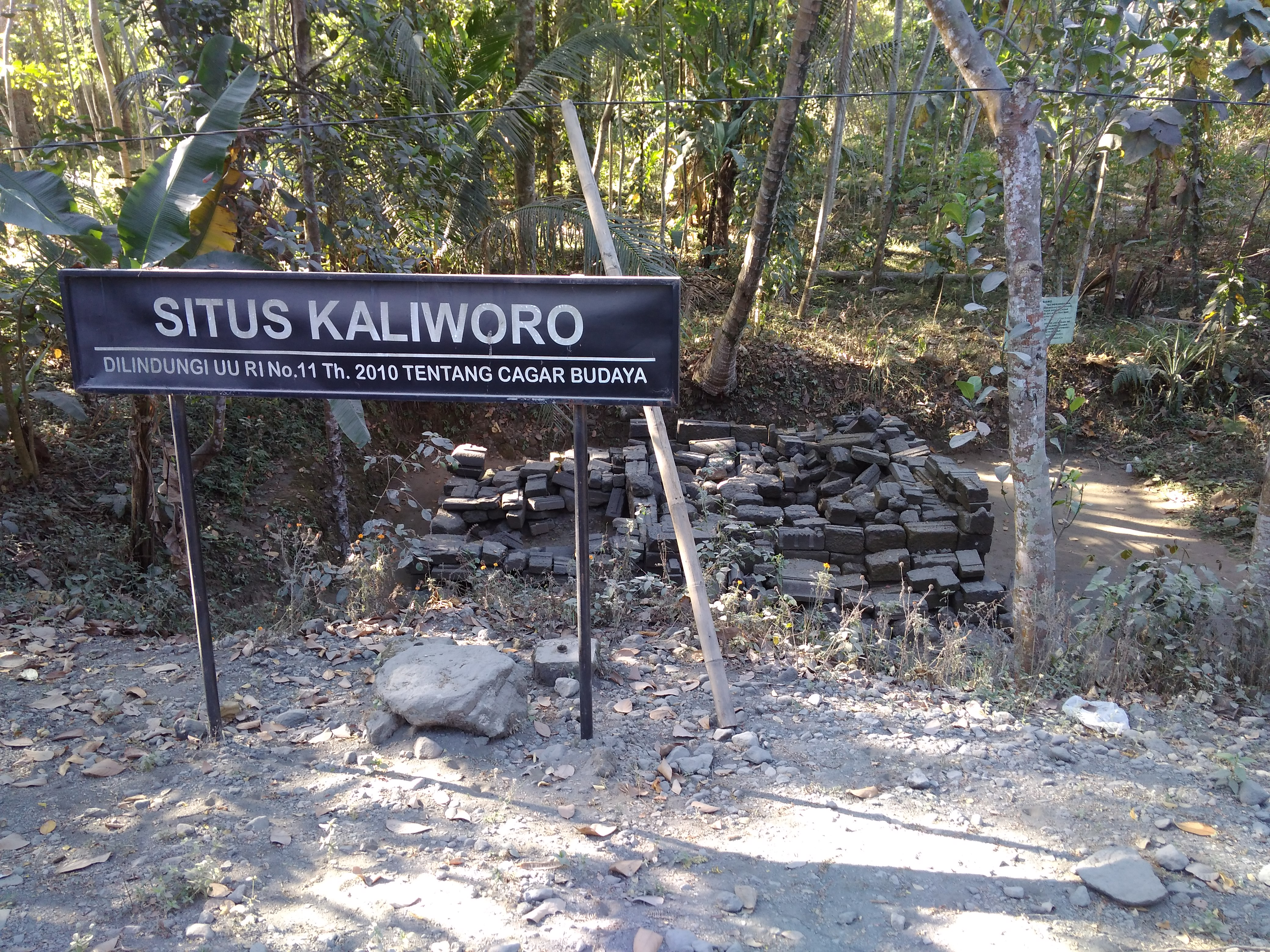 Situs Kaliworo B di Kecamatan Manisrenggo, Kabupaten Klaten